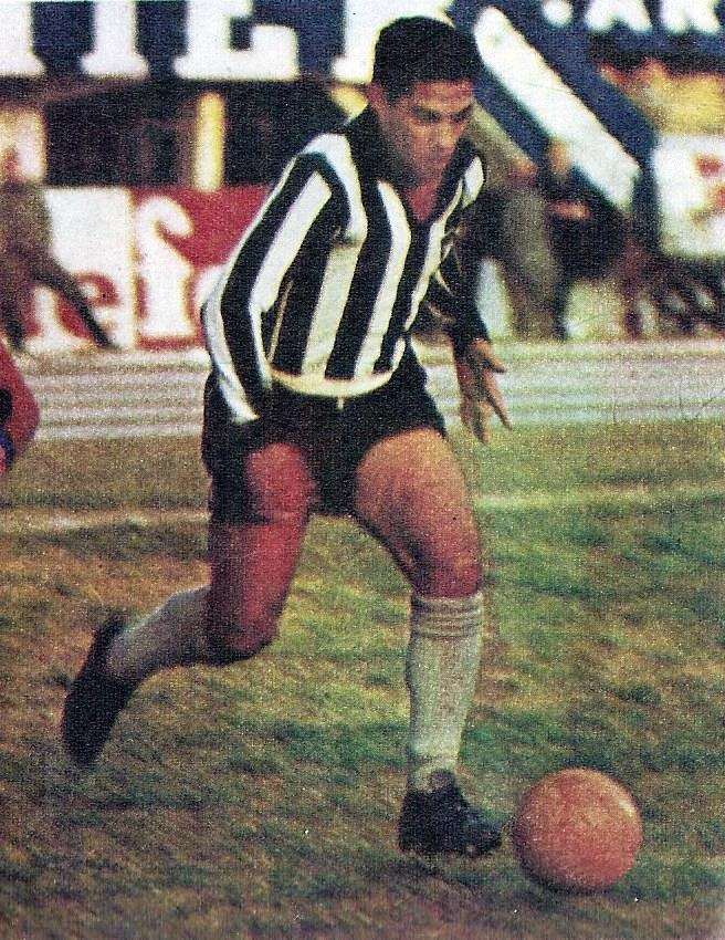 Garrincha jugando por Botafogo.